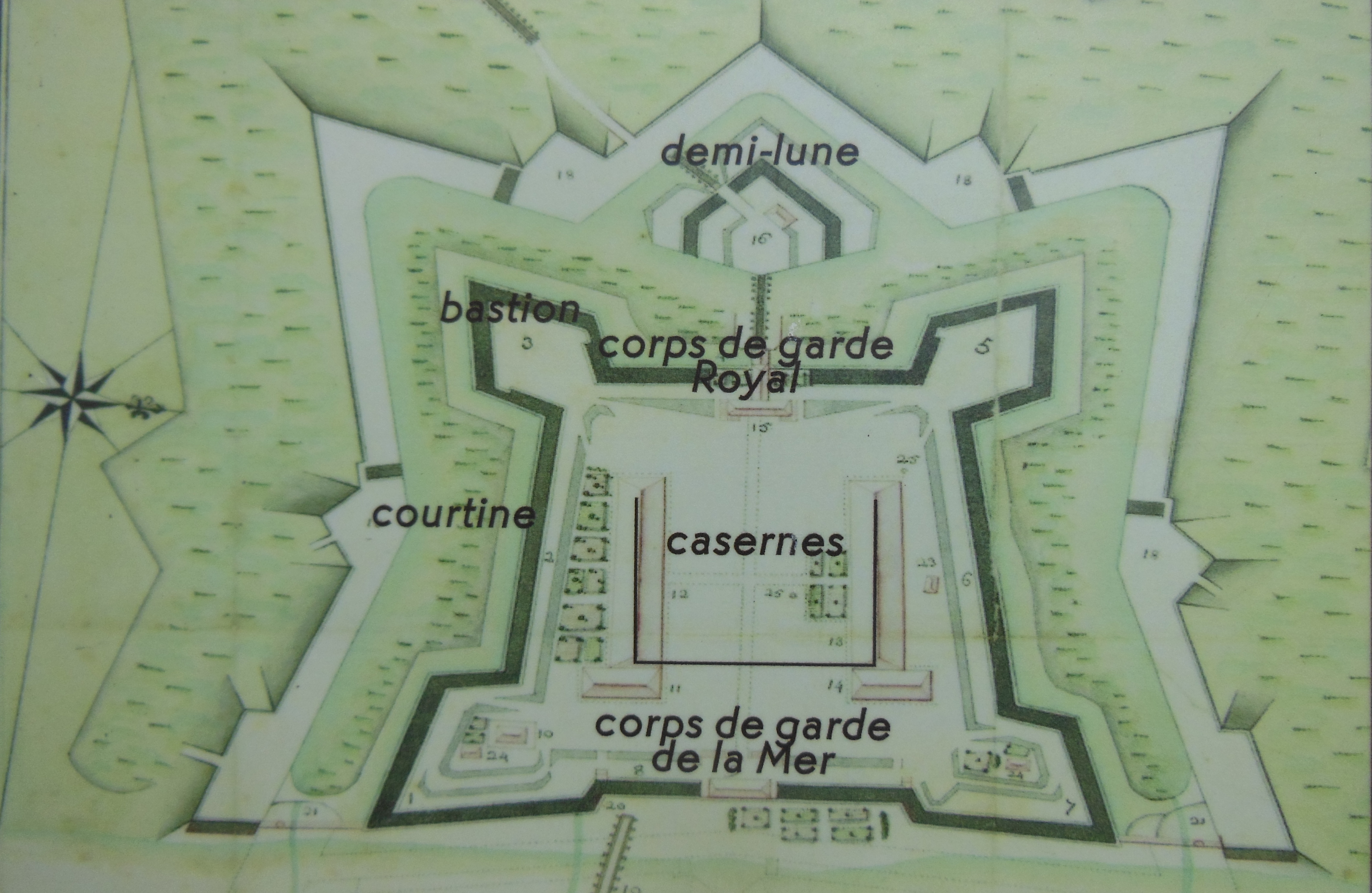 Plan du Fort Médoc, consulté sur site